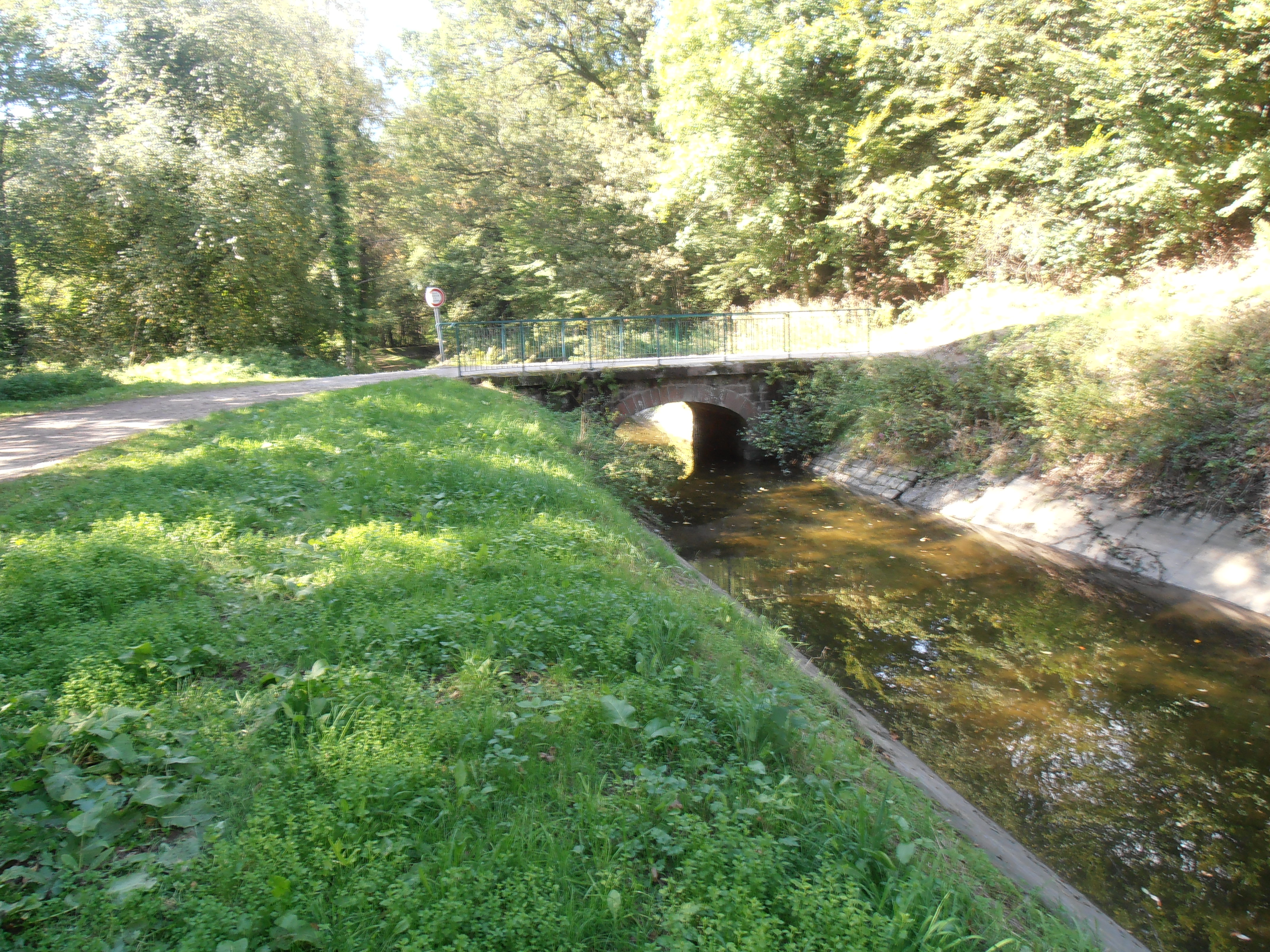 Vosges, Moraine de Noirgueux sur les communes de Saint-Nabord, Saint-Étienne-lès-Remiremont, Éloyes, Remiremont : le canal d'alimentation de Bouzey. Les travaux d'édification de la rigole et de ses ouvrages entre la prise d'eau de Remiremont et Arches, sur 19,467 km, ont débuté en 1882 et ont été terminés en 1887 (Extrait de « Le canal de l'Est, branche sud » par M. Boulet, ingénieur en chef des Ponts et Chaussées du département des Vosges, Science et industrie, 1935). La rigole principale débute à Saint-Etienne-lès-Remiremont. Une partie de l'eau de la Moselle est déviée sur la rigole, où elle s'écoule par gravité sur plus de 45 kilomètres jusqu'au réservoir de Bouzey. De là elle se déverse dans le canal des Vosges et sert aux besoins de la navigation, essentiellement des plaisanciers (Le canal d'alimentation de Bouzey, panneau de signalétique sur le sentier pédagogique de la moraine de Noirgueux)